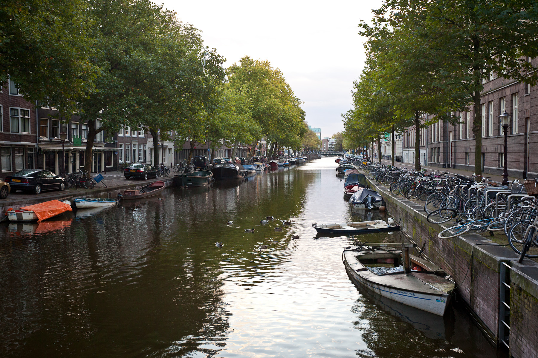 Amsterdam, achter de eerste boom links monument Lijnbaansgracht 254, achter de tweede boom Lijnbaansgracht 255